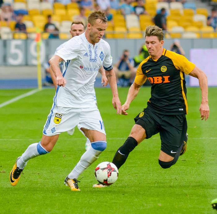 Christian Fassnacht und Andrij Jarmolenko beim CL-Qualifikations-Hinspiel Dynamo Kiew gegen BSC Young Boys